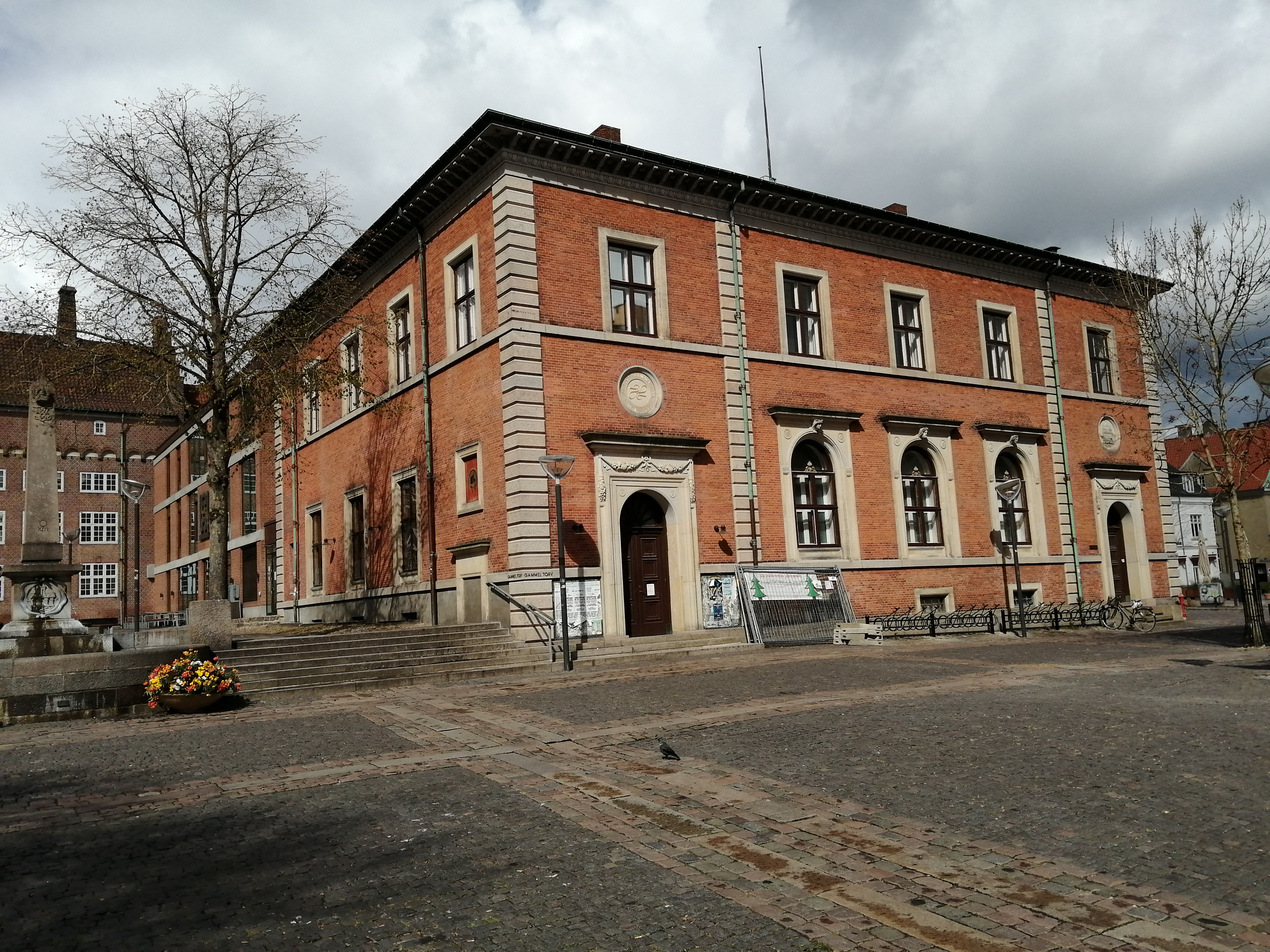 Fotograferet fra Gammeltorv.